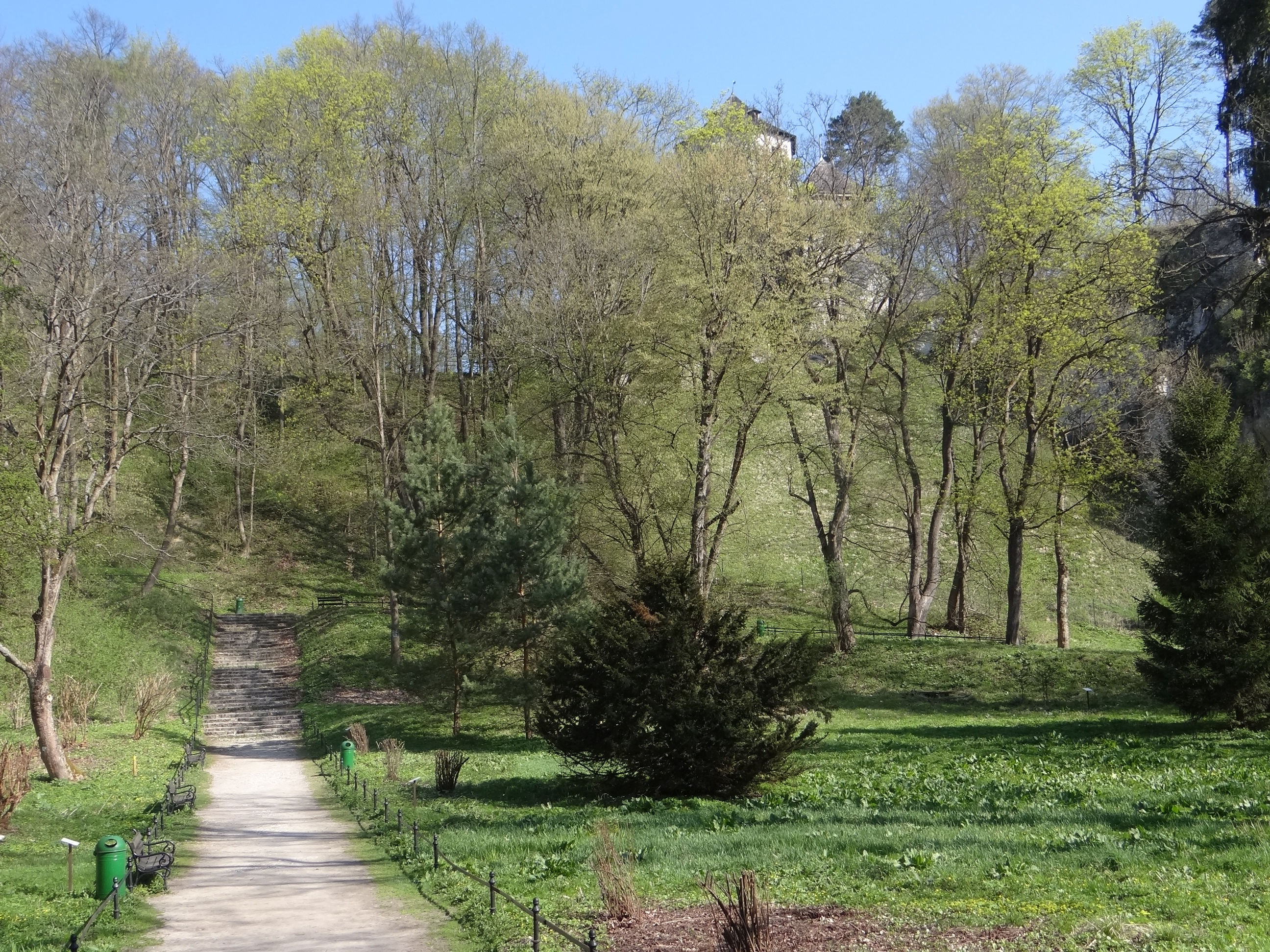 Park Zamkowy w Ojcowie